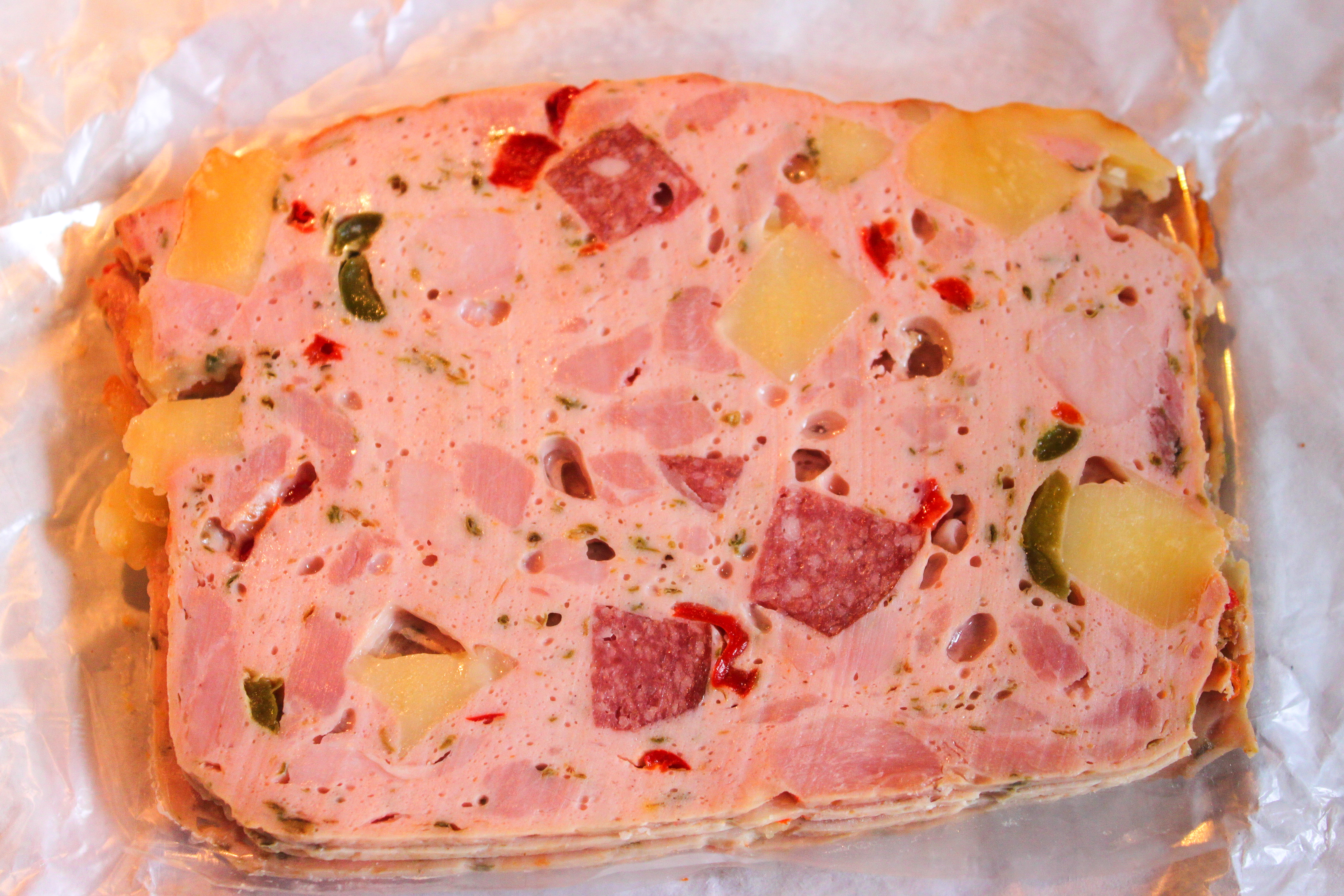 Bei Pizzaleberkäse wird Schinken, Salami, Champignons, rote und grüne Paprika, Käse mit Leberkäsebrät vermengt. Metzgerei Lauterbach, Kulmbach.